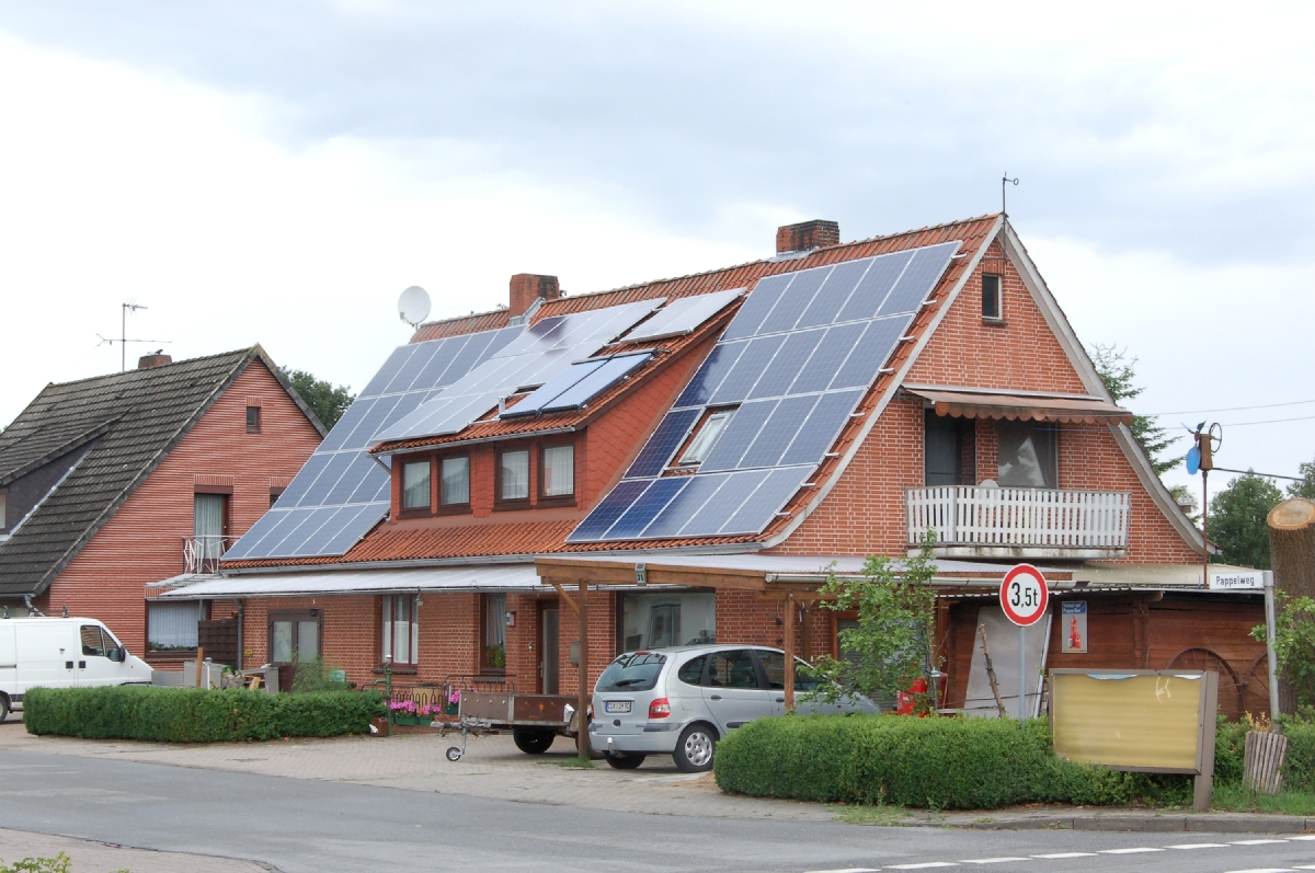 Bild aus Lamstedt